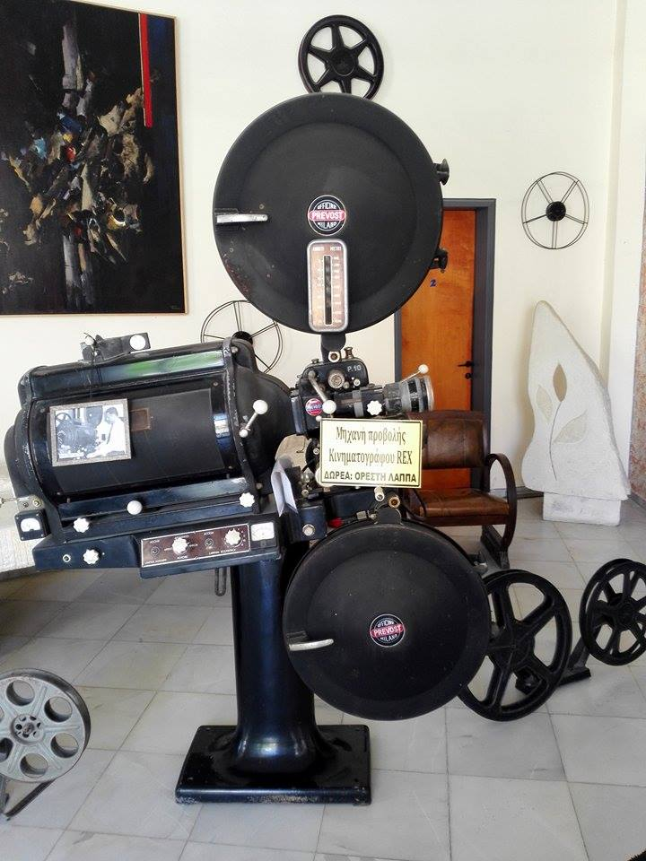 Παλιά μηχανή κινηματογραφικής προβολής στην Ιεράπετρα. Δωρεά Ορέστη Λάππα.